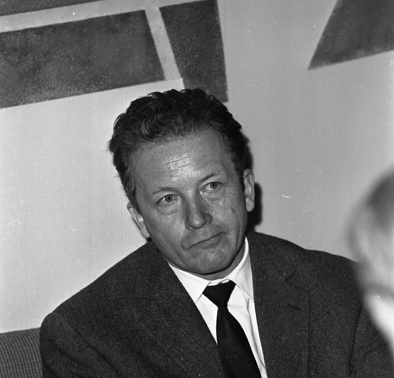 Ökumenische Persönlichkeiten beim WDR in Köln Portrait des Intendanten des WDR, Klaus von Bismarck